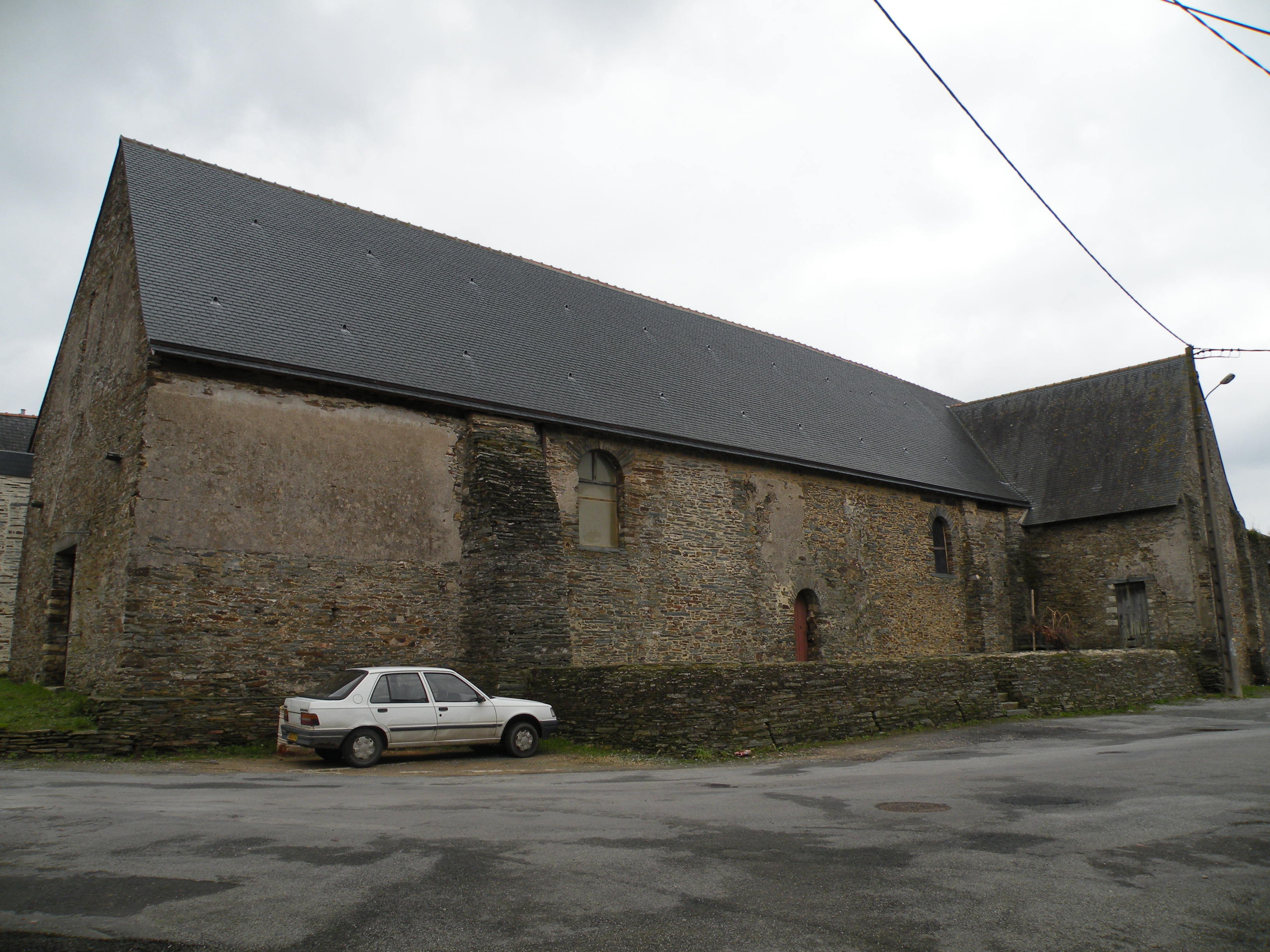 Nef de l’ancienne église Saint-Saturnin-du-Vieux-Bourg à Nozay.